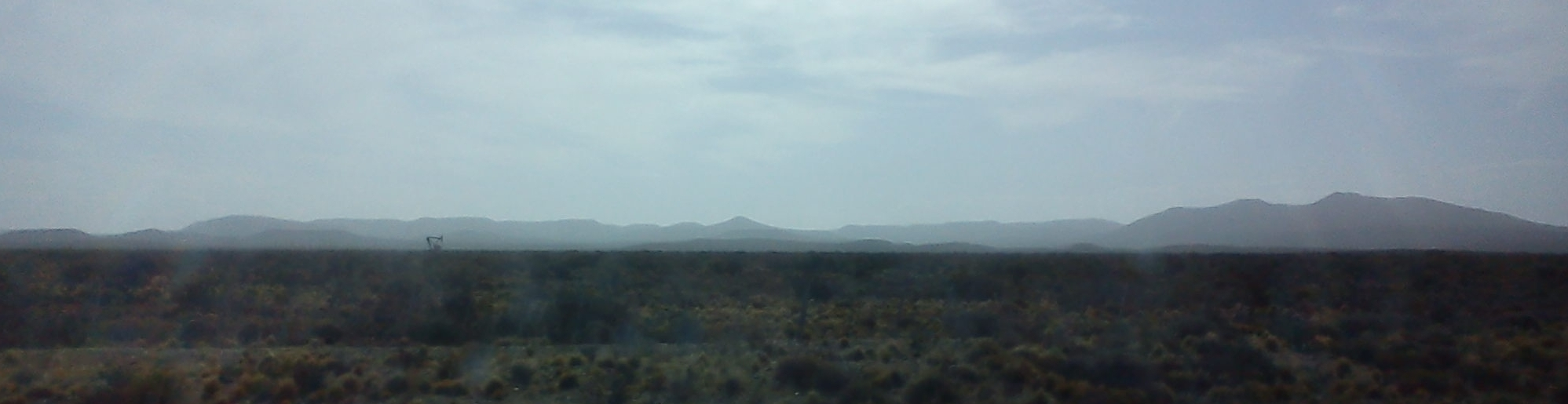 Vista al Cerro El Puntudo, la saque a la foto dentro de un auto en la ruta 3